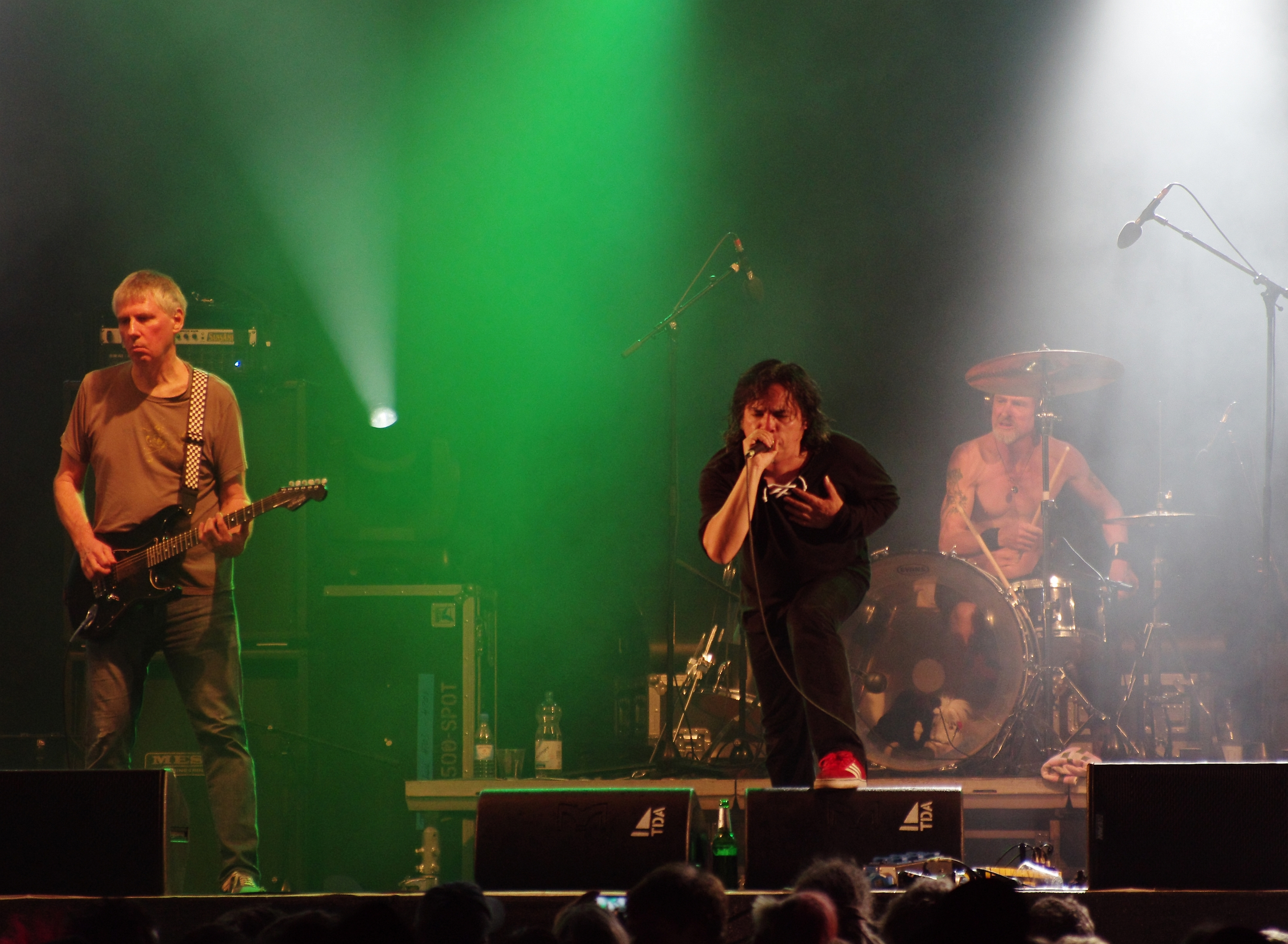 Black Flag beim Ruhrpott Rodeo 2013 in Hünxe. Besetzung: Dave Klein (Bass), Greg Ginn (guitar), Ron Reyes (voc), Gregory Moore (dr)